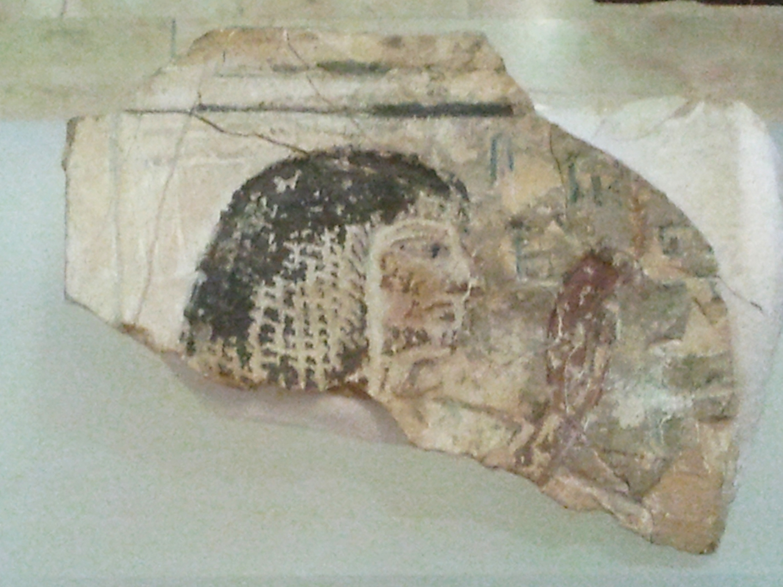 תבליט צבוע ועליו הכתובת MES ילד מאבן גיר. מדיר אל-מדינה במצרים. השושלת ה-19. אוסף מוזיאון הכט